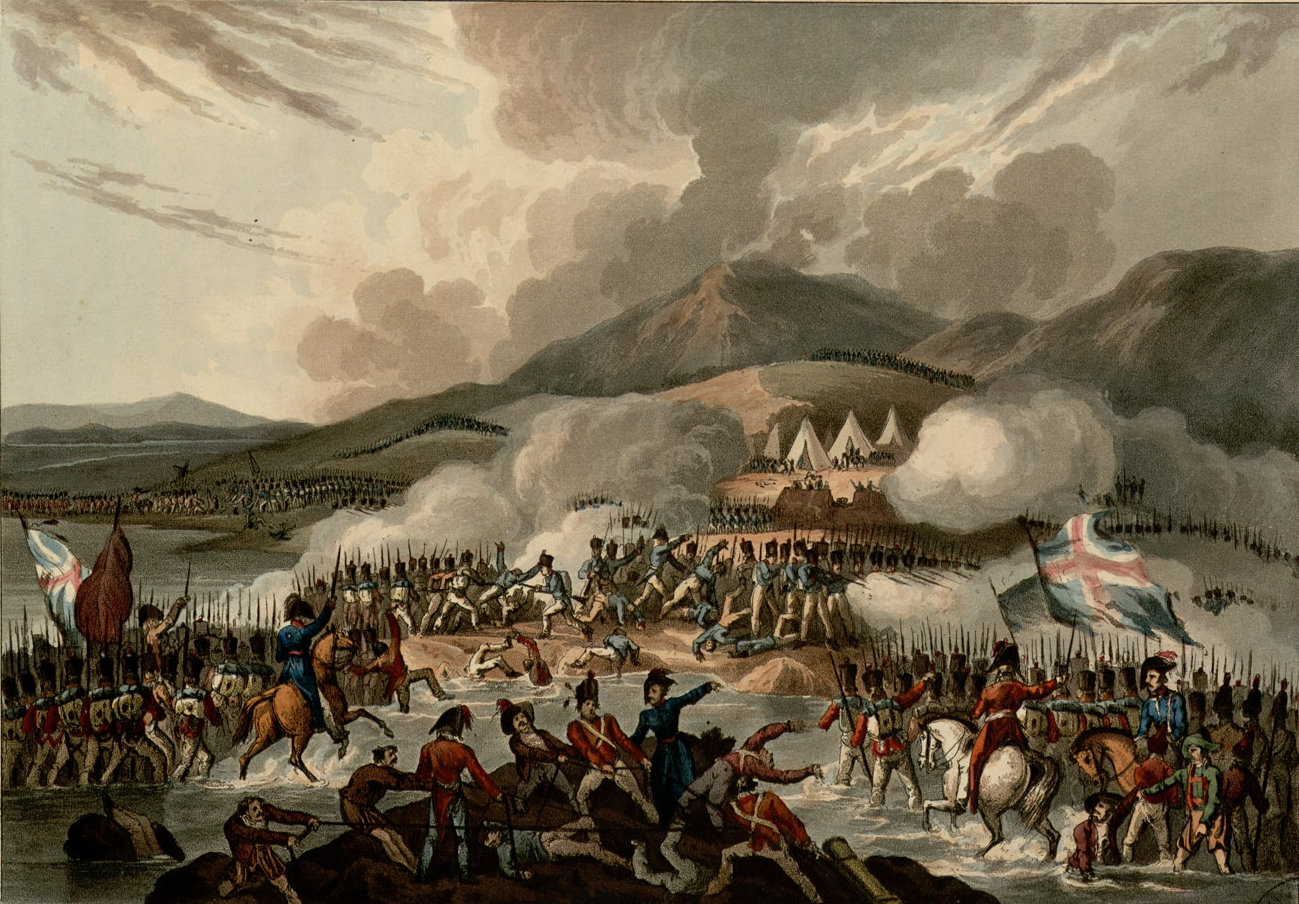 Fait partie d'un volume de gravures sur cuivre par T. Sutherland et D. Havell réhaussées à l'aquarelle. Titre gravé illustré en n. et b. Chaque gravure est suivie d'un texte explicatif. + in fine : "Contents", and "Names of Subscribers to the Martial Achievements of Great Britain and her allies". Ancely, René (1876 - 1966). Possesseur